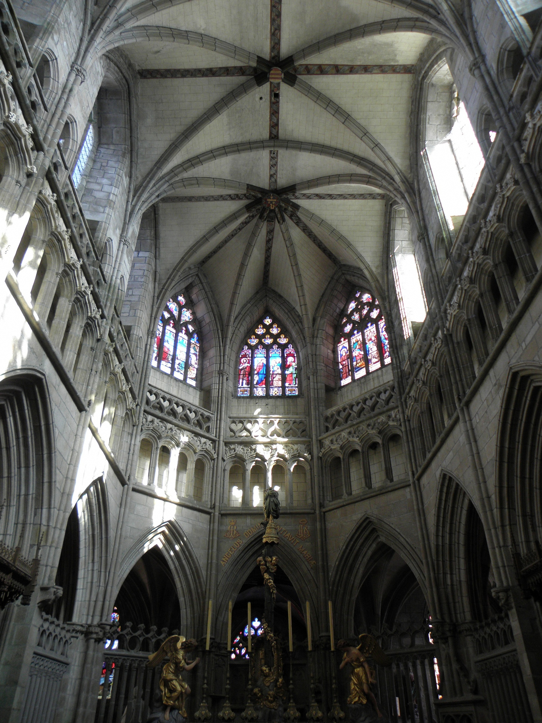 Élévation et voûtes du chœur de la cathédrale Saint-Paul-Aurélien de Saint-Pol-de-Léon (29). .